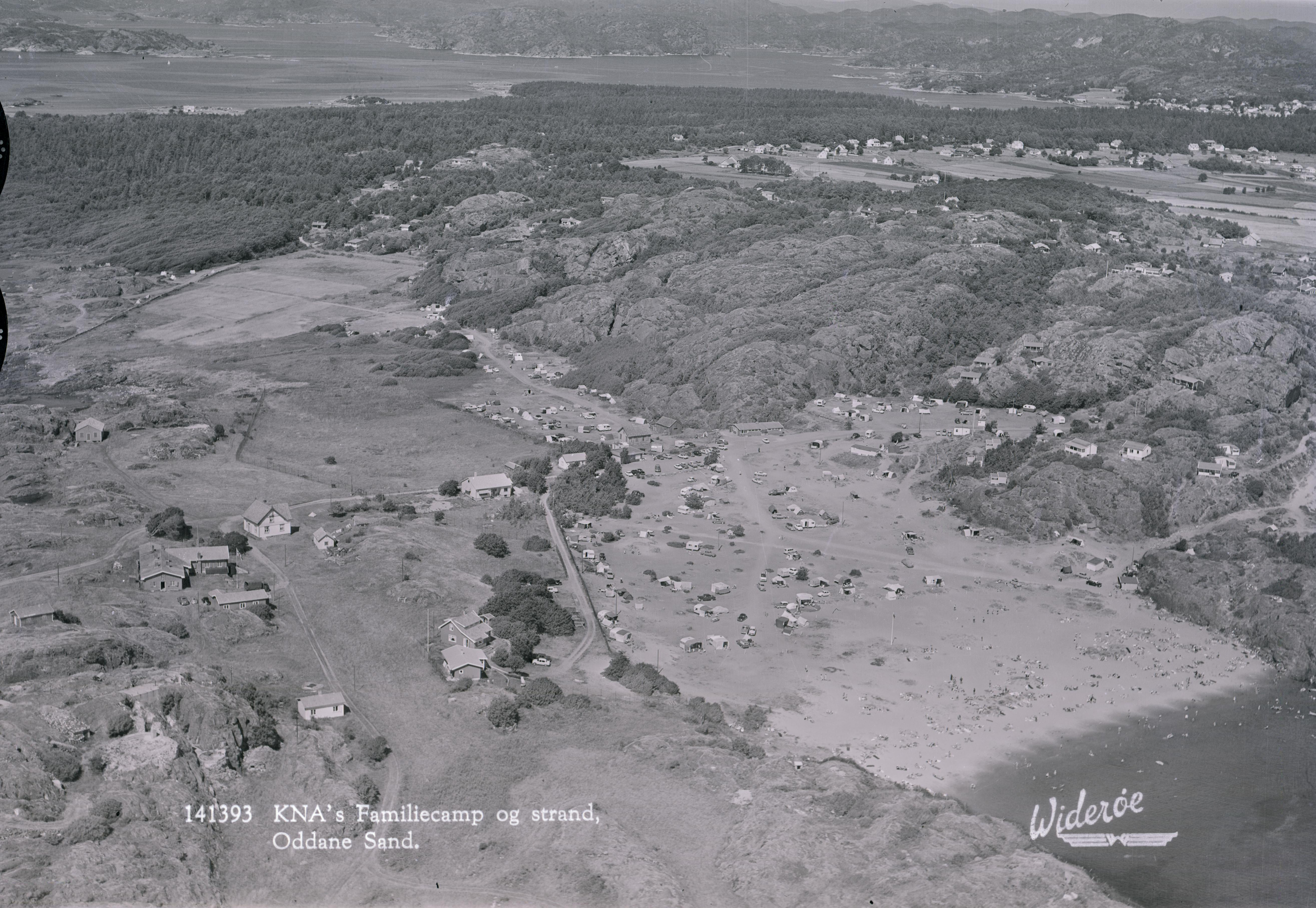 KNAs familiecamping og strand WF.HL.141393